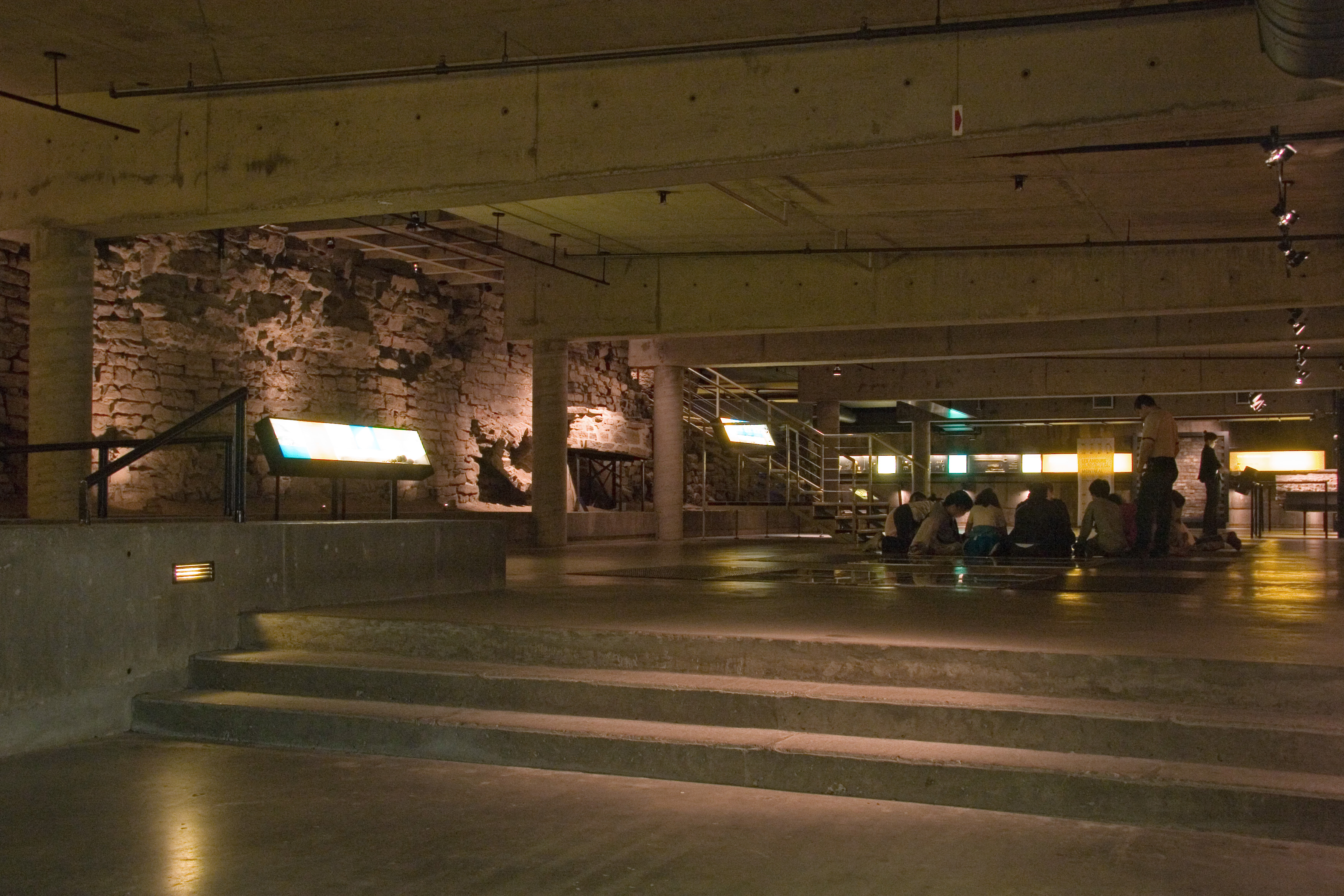 Sous-sol du musée Pointe-à-Callière, Montréal / Basement of the Pointe-à-Callière museum, Montreal